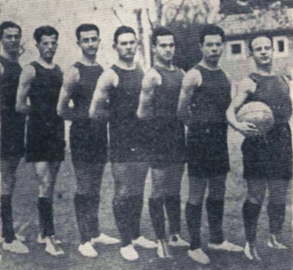 Η ομάδα μπάσκετ της ΑΕΚ το 1928